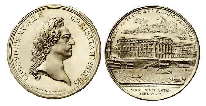 Médaille pour Louis XV, construction de l'Hôtel de la Monnaie, argent, 1770. Diamètre 63 mm. Revers : AURO ARGENTO AERIS FLANDO FERUNDIO (Pour fondre et frapper l'or, l'argent et le bronze). Collections de la Monnaie de Paris. Héliogravure par Paul Dujardin dans Les médailles de l'ancienne collection royale par Alfred de Foville. Imprimerie nationale, 1900.